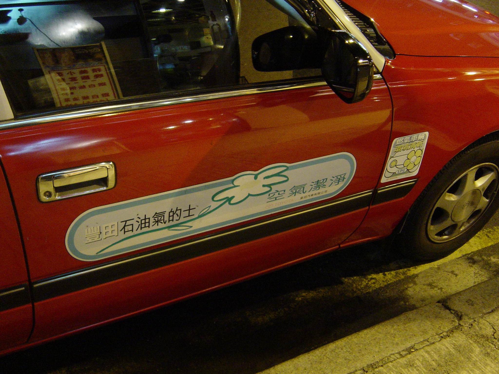 香港石油汽的士車身標誌。LPG taxi in Hong Kong.